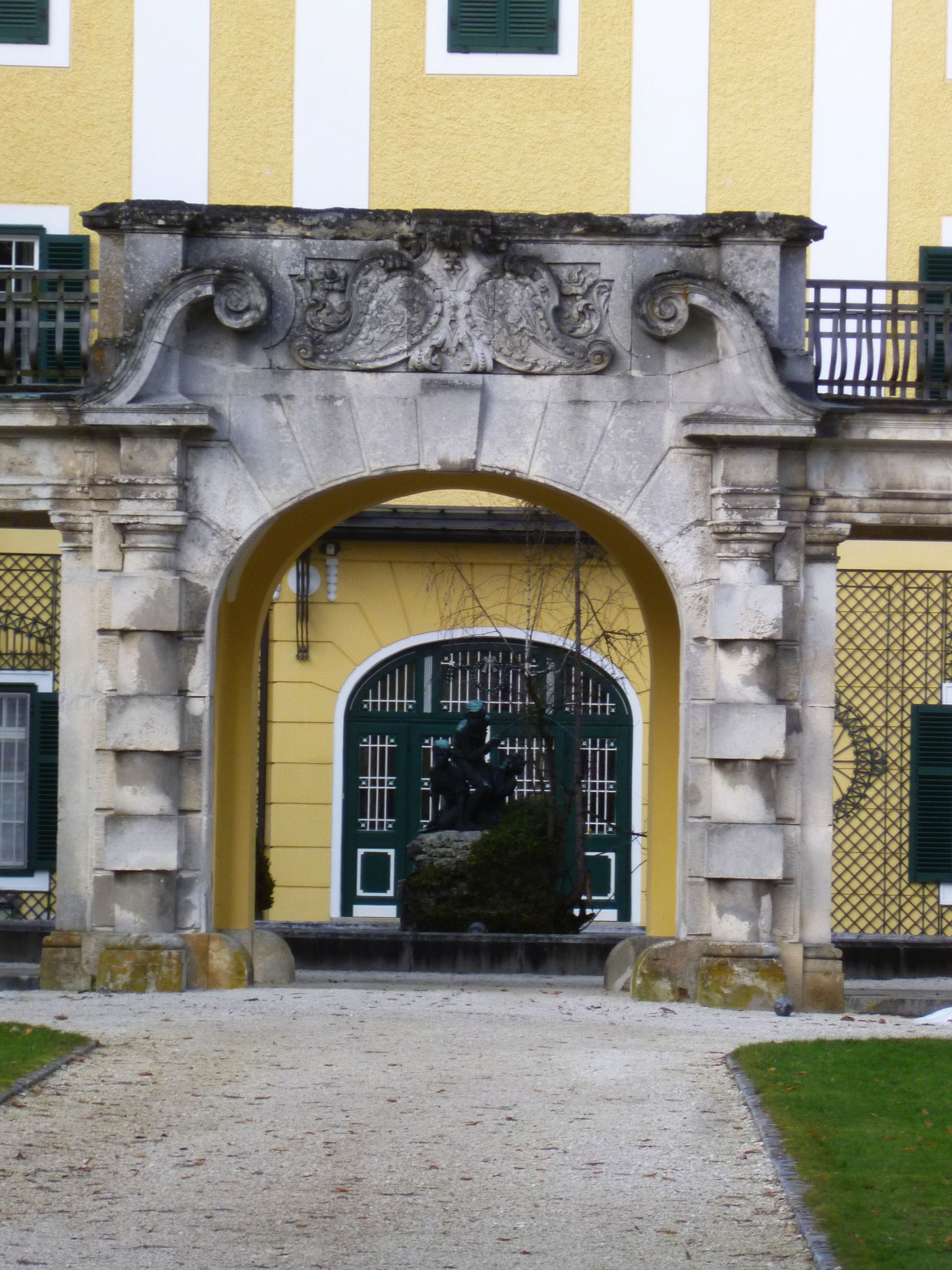 Eingangsportal des Schlosses Kogl in St. Georgen im Attergau